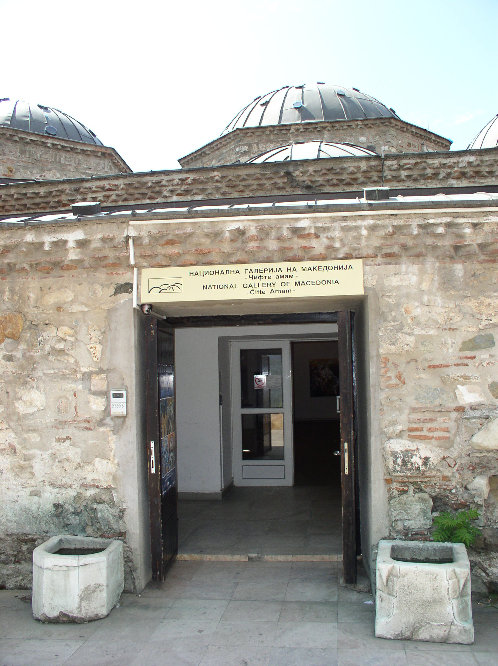 Улаз у објекат Чифте амама у којем се налази Национална галерија